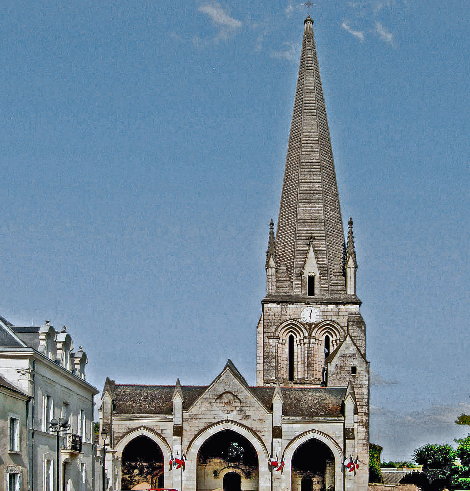 12è 13è 15è 17è, porche 19è .